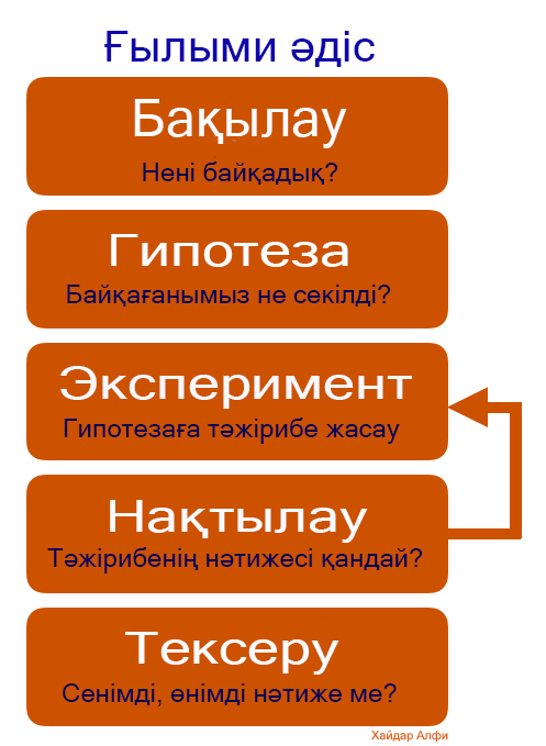 Қазақша (кирил): ̥Ғылыми әдіс сипатталған.